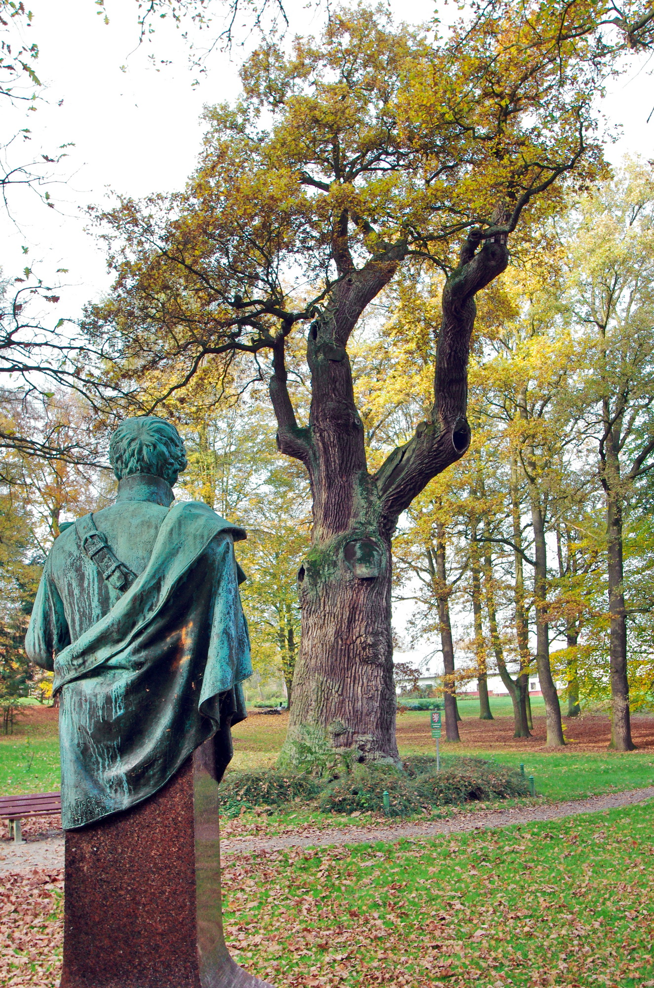 Památný strom Körnerův dub, Dalovice, okres Karlovy Vary